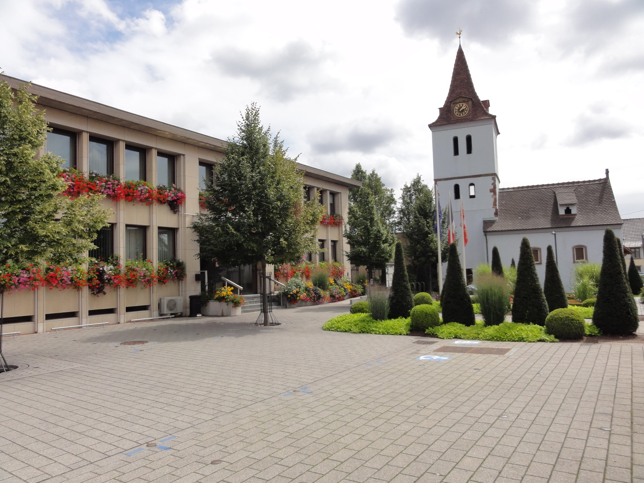 Alsace, Bas-Rhin, Hoenheim, Hôtel de Ville et Chapelle Saint-Jean (XIIIe?), rue de la République.